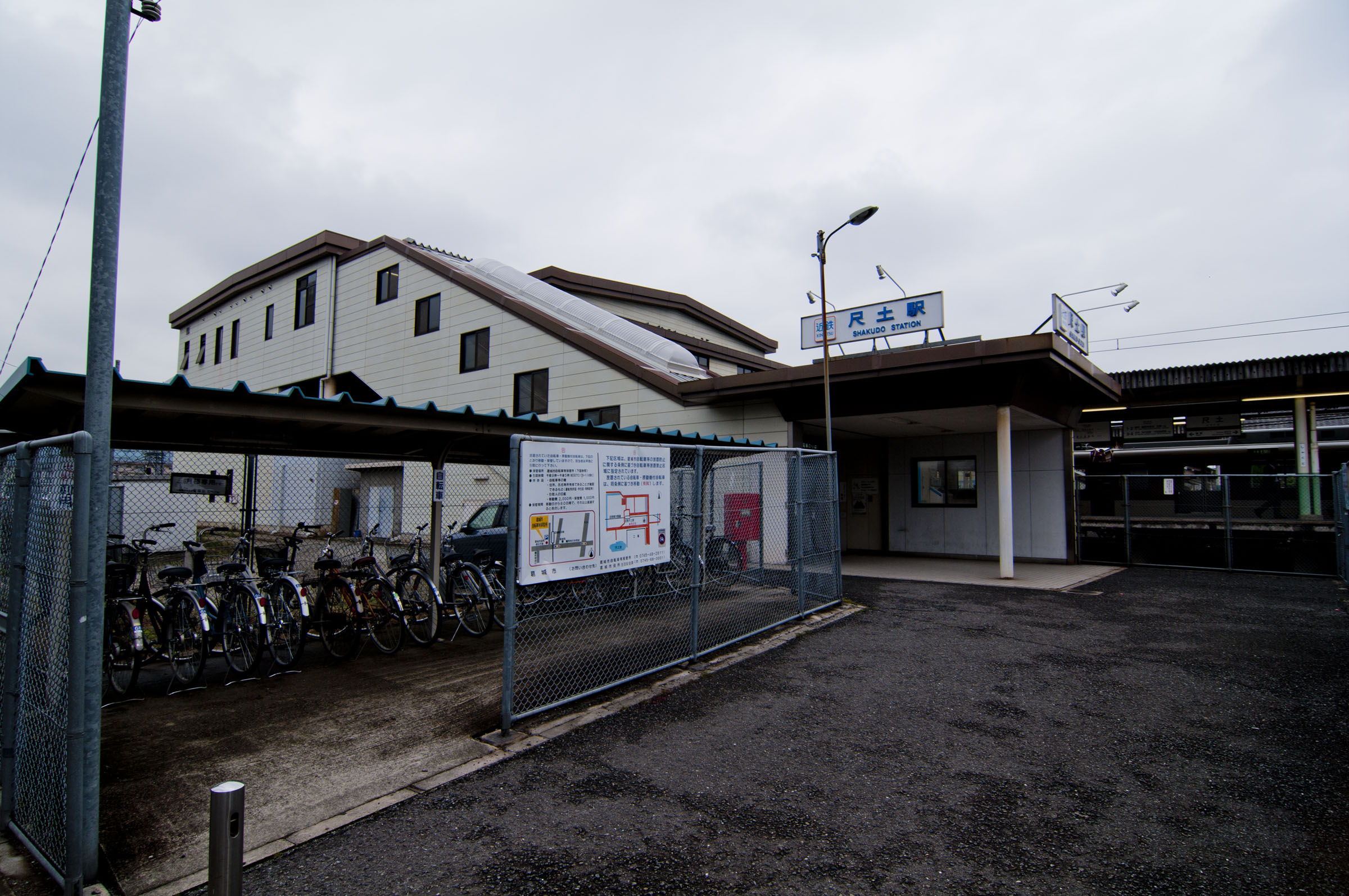 近畿日本鉄道南大阪線、御所線尺土駅駅舎